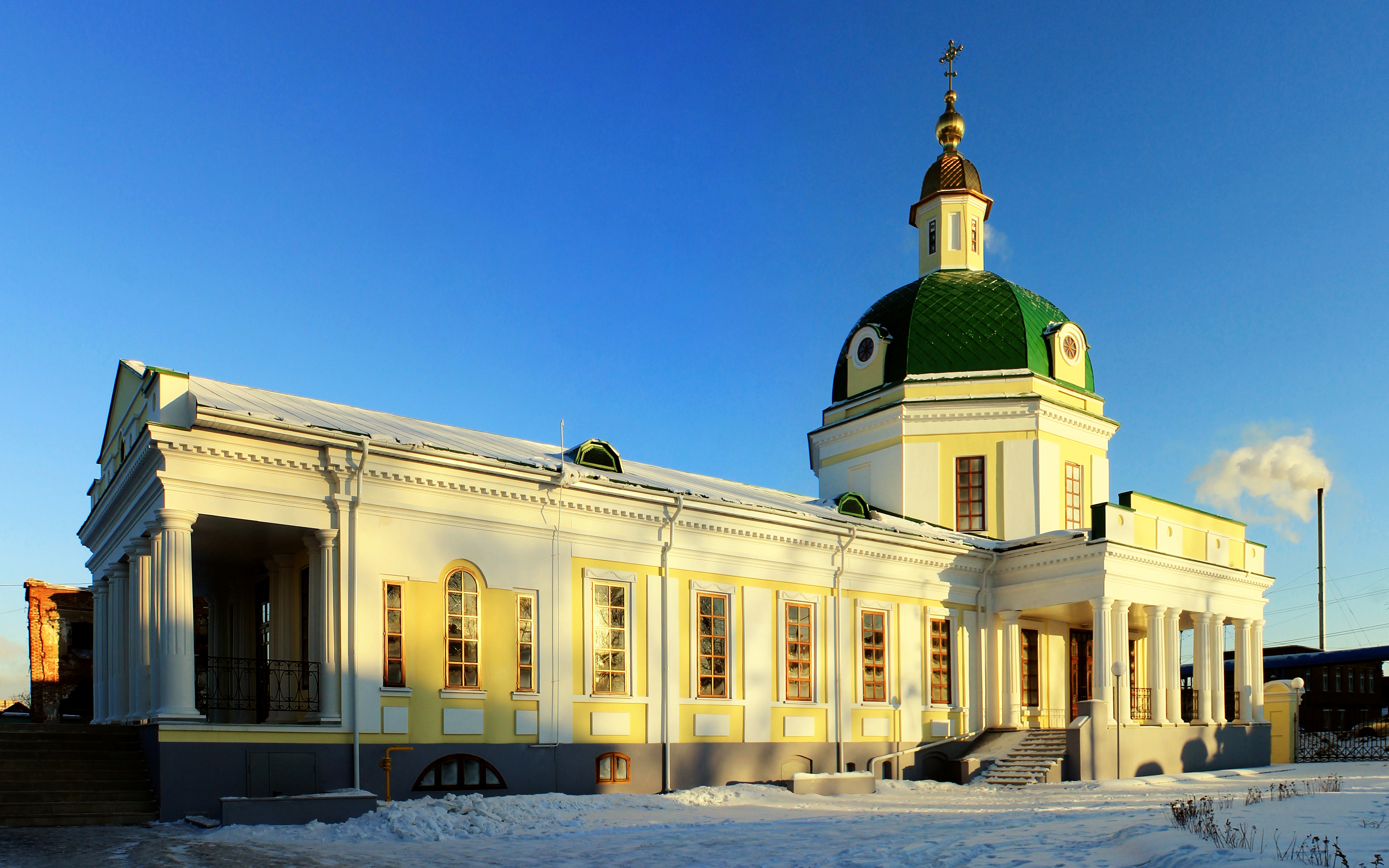 Покровская церковь (Удмуртская Республика, Сарапул, труда улица, 38)